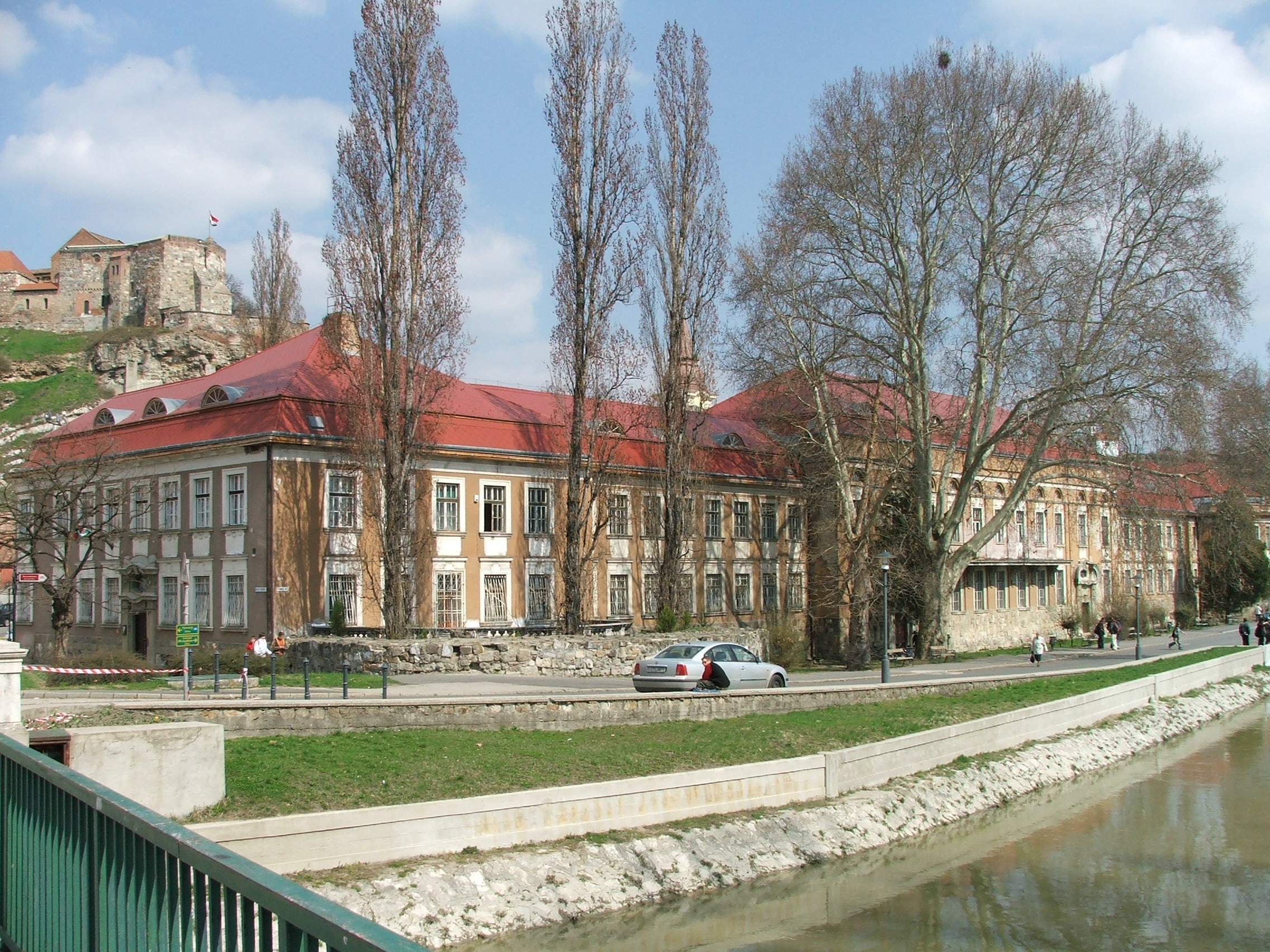 Szent István Gimnázium, Esztergom St Stephen Secondary Highschool, Esztergom, Hungary